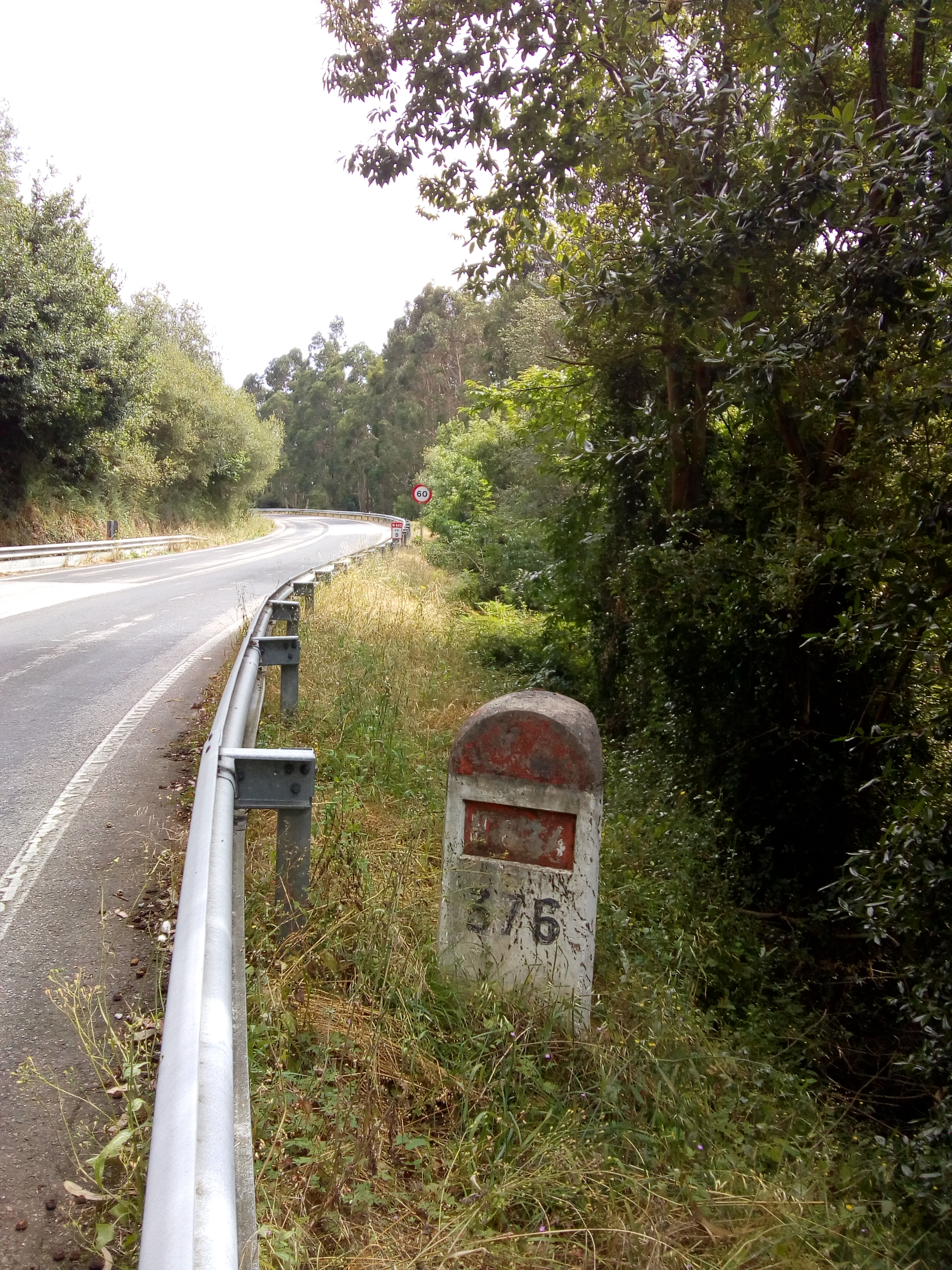 Fito quilométrico N634 km 376, na actualidade, ó pé da N642 preto do km 5, visible na foto.